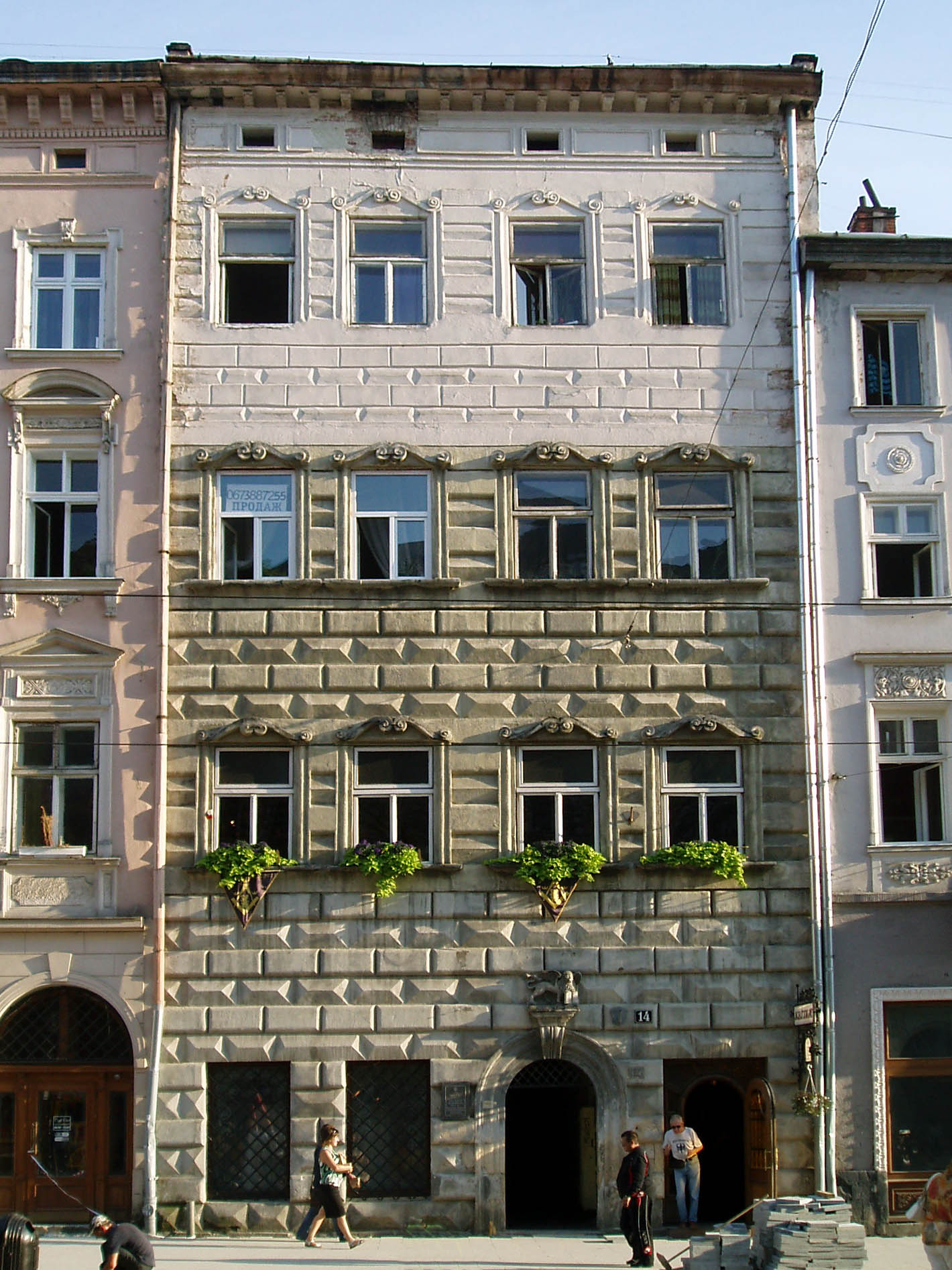 Венеційська кам'яниця у Львові. Збудована у XVI ст.